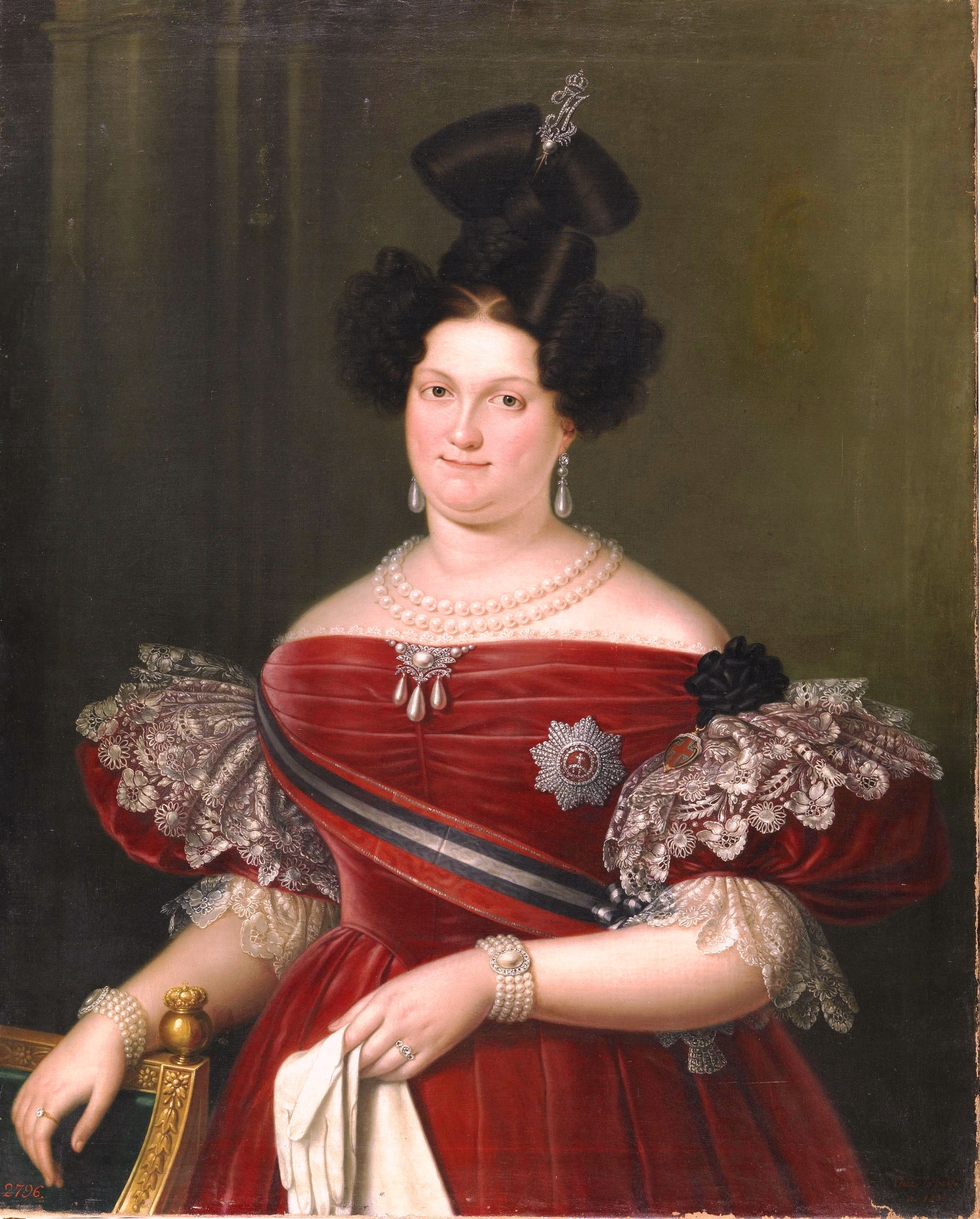 Retrato de la reina María Cristina de Borbón-Dos Sicilias (1806-1878), que fue reina consorte de España por su matrimonio con el rey Fernando VII de España, de quien fue la cuarta esposa.